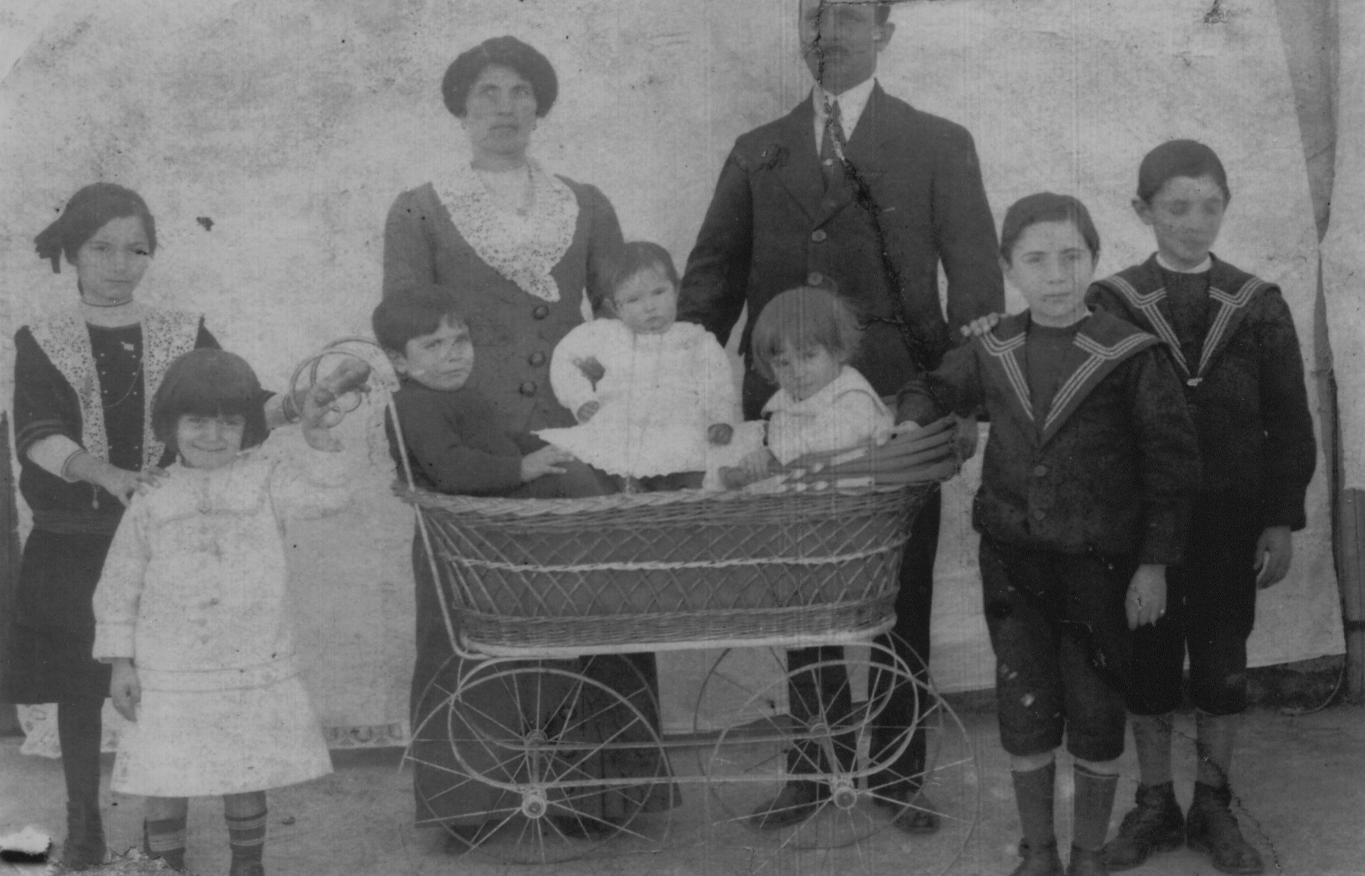 La famiglia di Giuseppe Riggio nell'anno 1915.